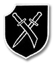 Symbol of the 28. SS-Freiwilligen-Panzergrenadier-Division „Wallonien” (wallonische Nr. 1)